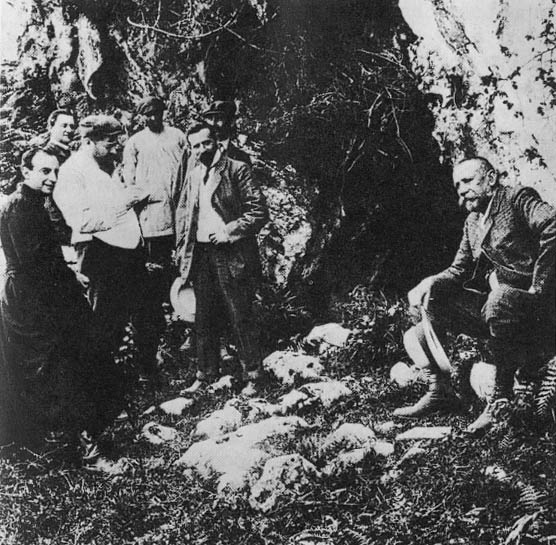 Cueva del Castillo, 23 de julio de 1909, el Abate Henri Édouard Prosper Breuil (con sotana), Hugo Obermaier (al fondo), Hermilio Alcalde del Río (centro con sombrero en la mano) y Alberto I de Mónaco (sentado a la derecha).